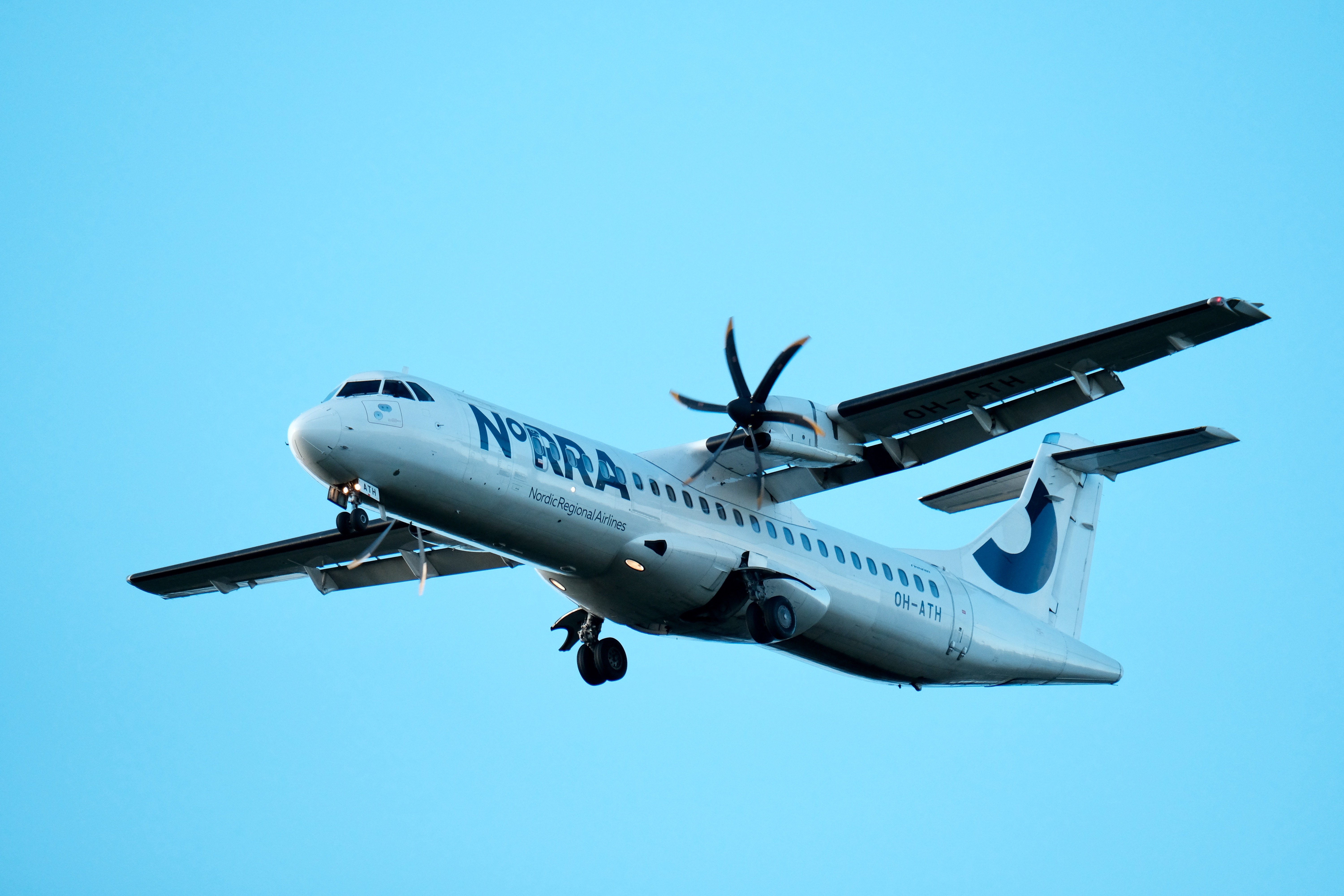 Fujinon 100-400 test